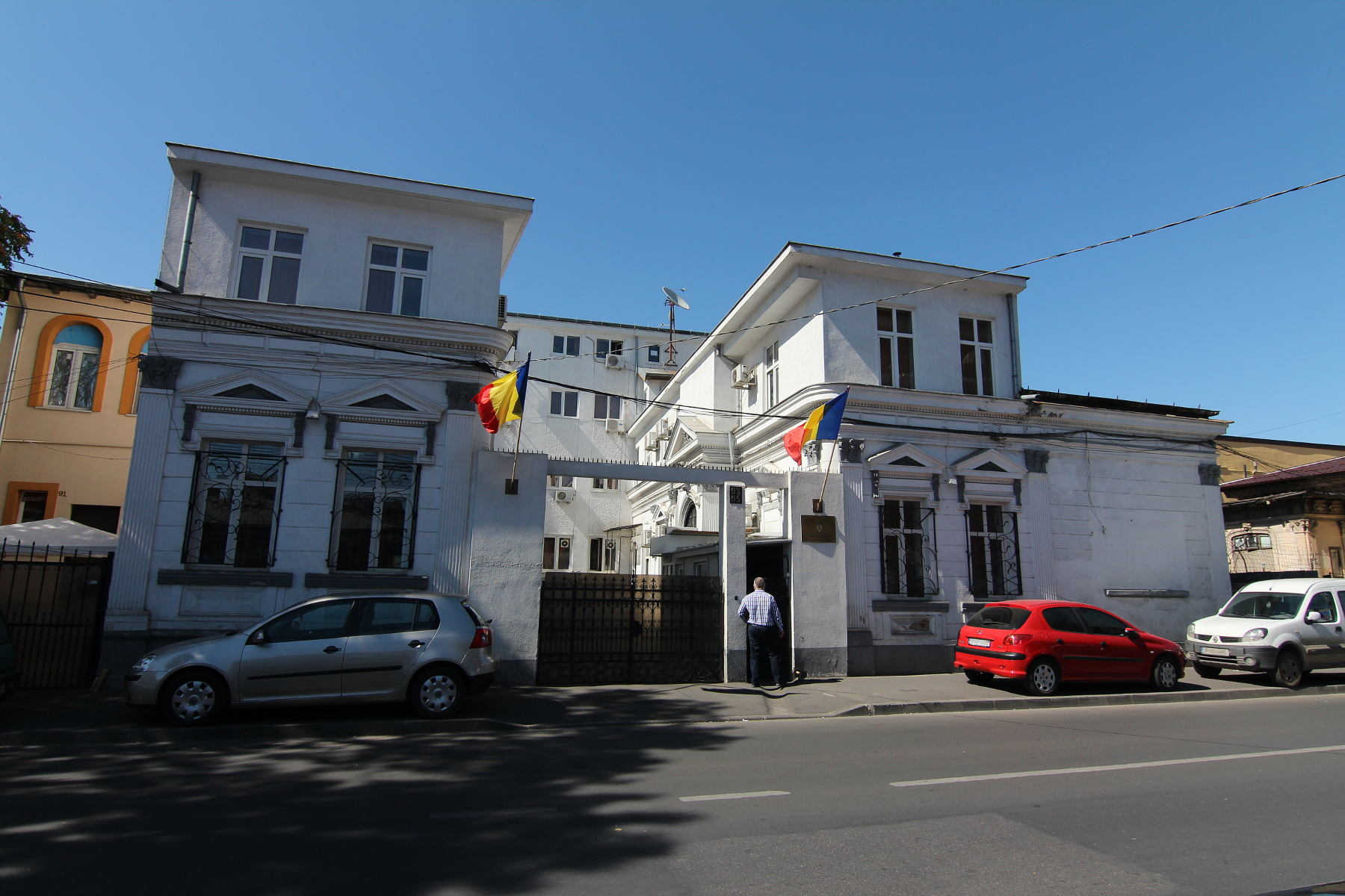 Casa pe strada Traian